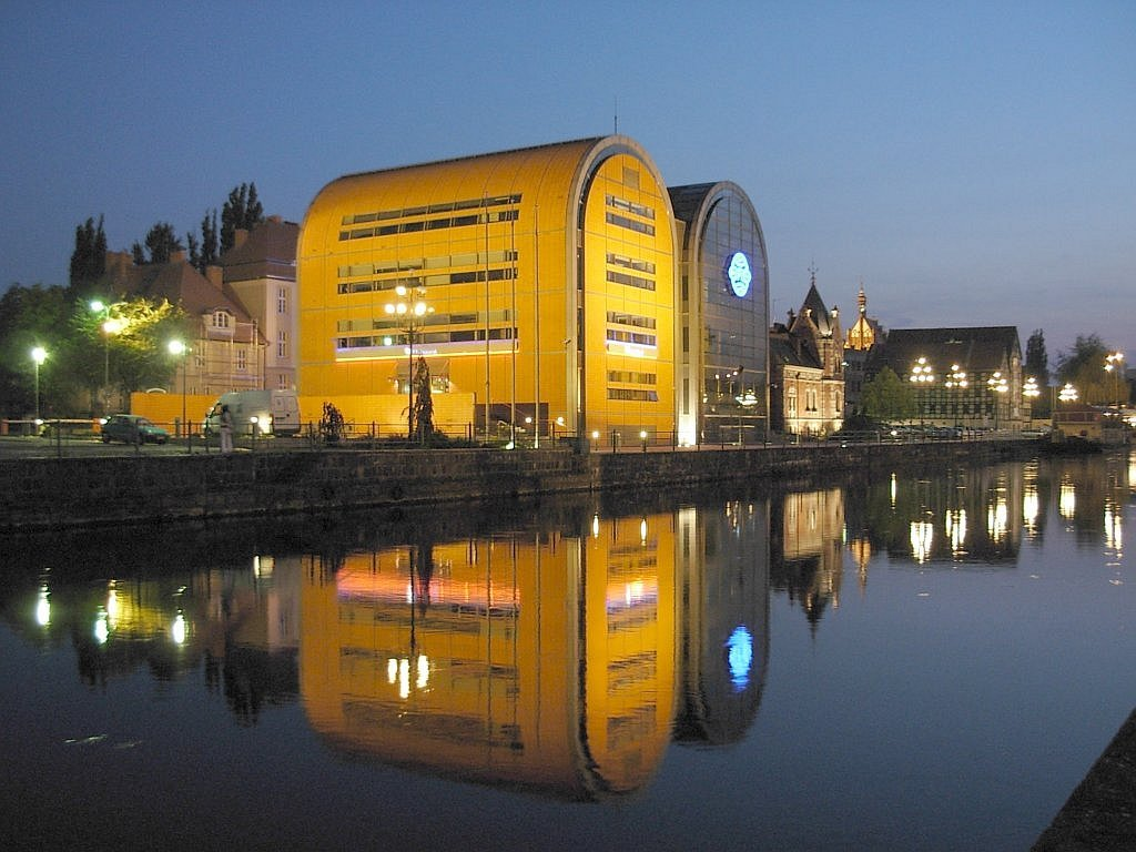 Nowe spichrze BRE